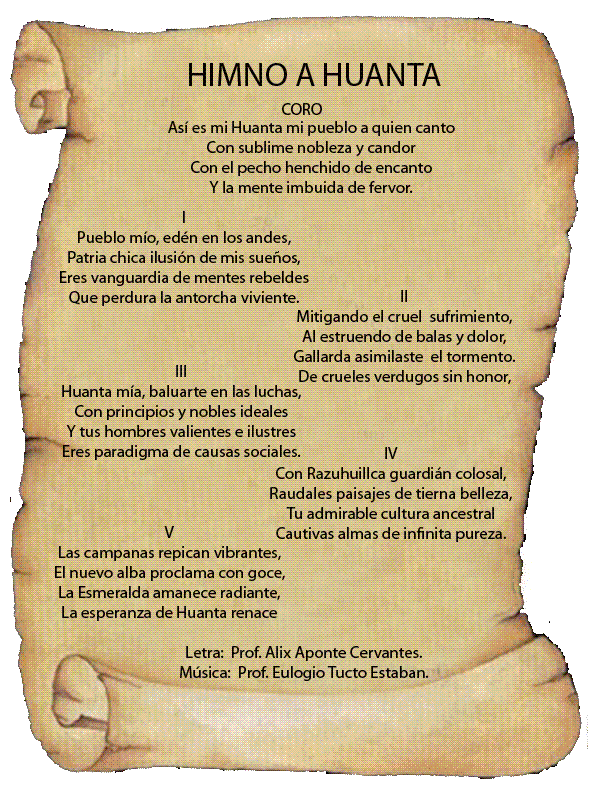 Himno a Huanta